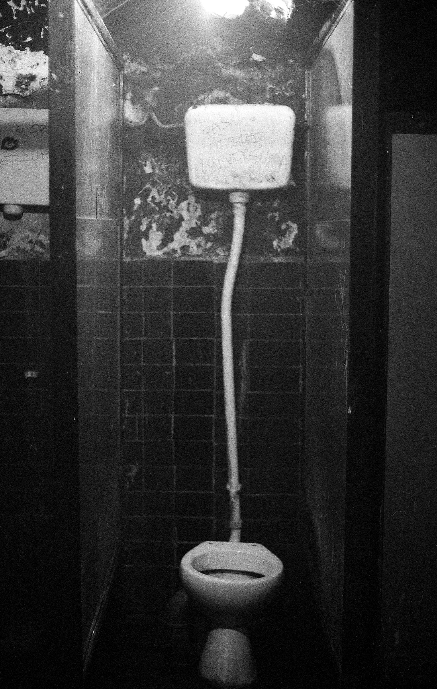 WC u klubu Akademija, Beograd, početak devedesetih. --Ранко (разговор) 12:08, 30. јануар 2015. (CET)